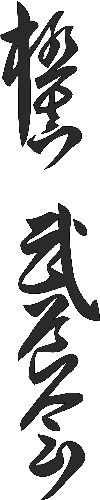 Каллиграфия (яп. канзи, канджи) Кёкусин Будокай Кан